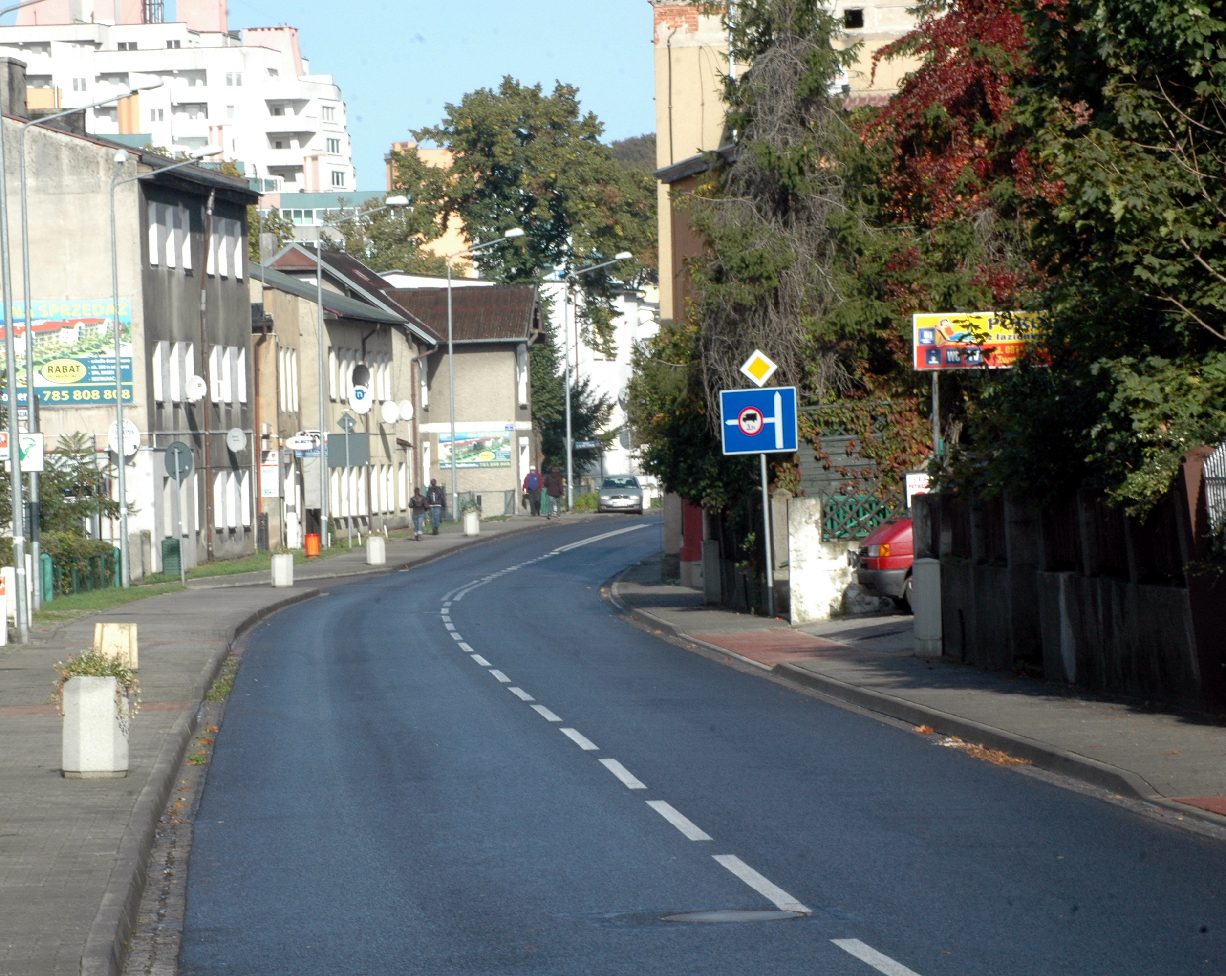 Droga wojewódzka nr 102 w Międzyzdrojach